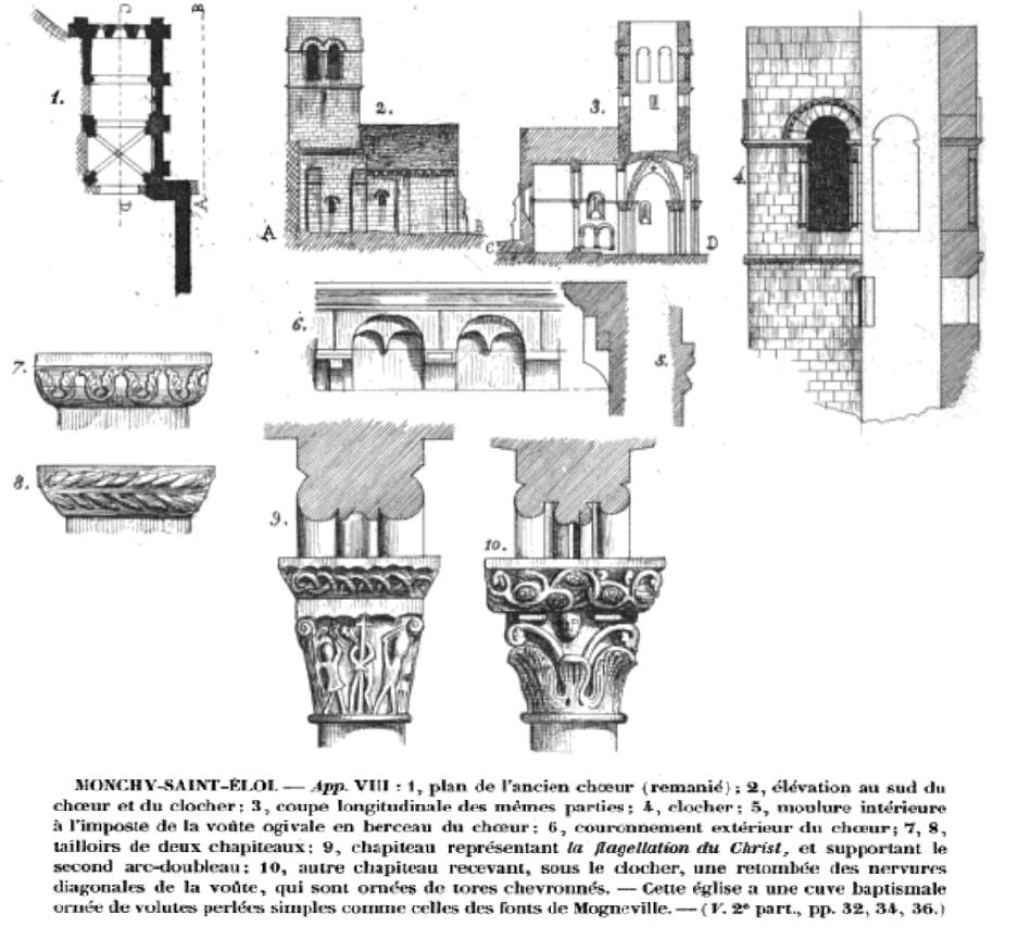 Croquis d'architecture relevés sur place ; voir l'illustration pour la légende.